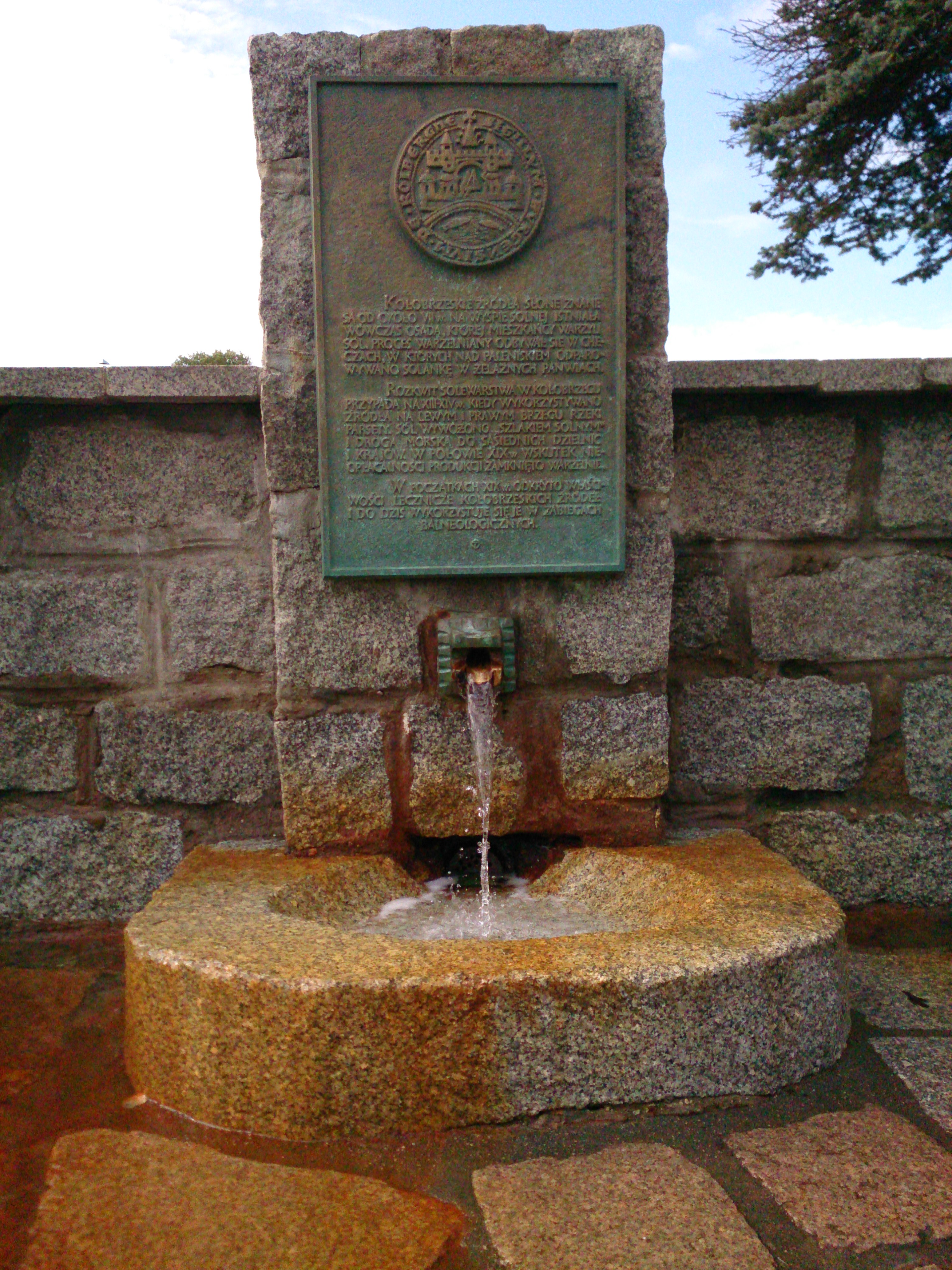 Der Solebrunnen in Kolobrzeg/Kolberg